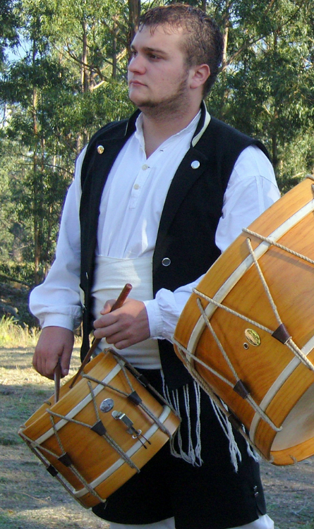 Tamborileiro tocando o tambor galego